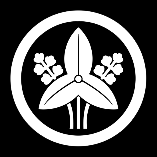 「丸に立澤瀉」紋（染抜）